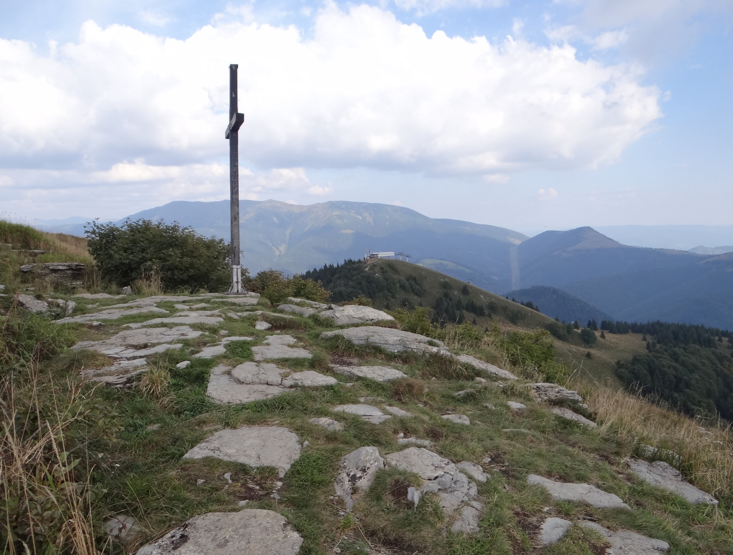 Zvolen